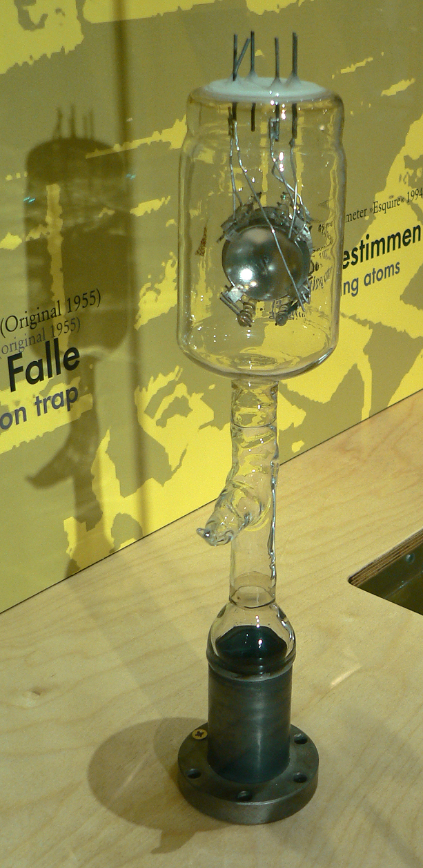 Paul Falle von 1955, Nachbau von 1965, Deutsches Museum Bonn